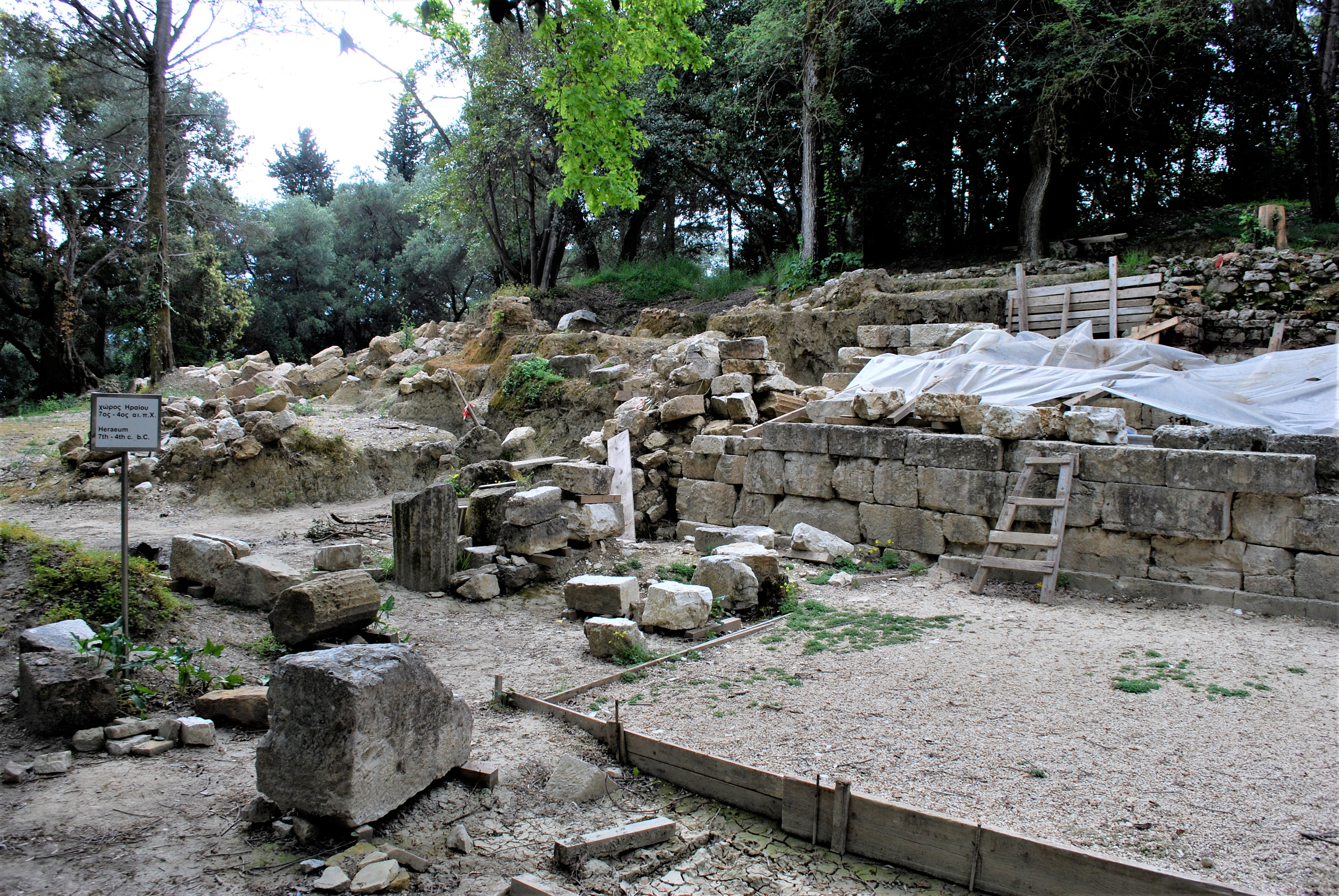 Vue du site archéologique de Paleopoli à Corfou.